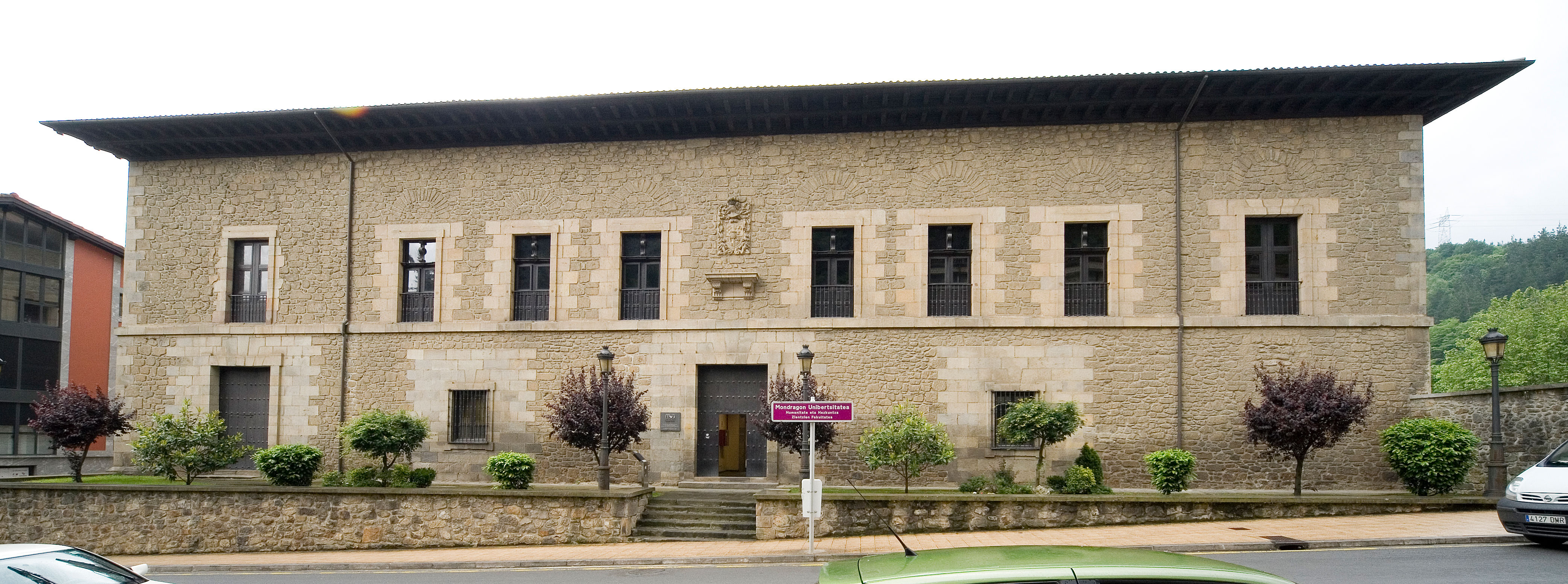 Antiguo hospital del Santo Rosario; actual sede de la Facultad de Humanidades y Ciencias de la Educación de Mondragon Unibertsitatea, en Eskoriatza.